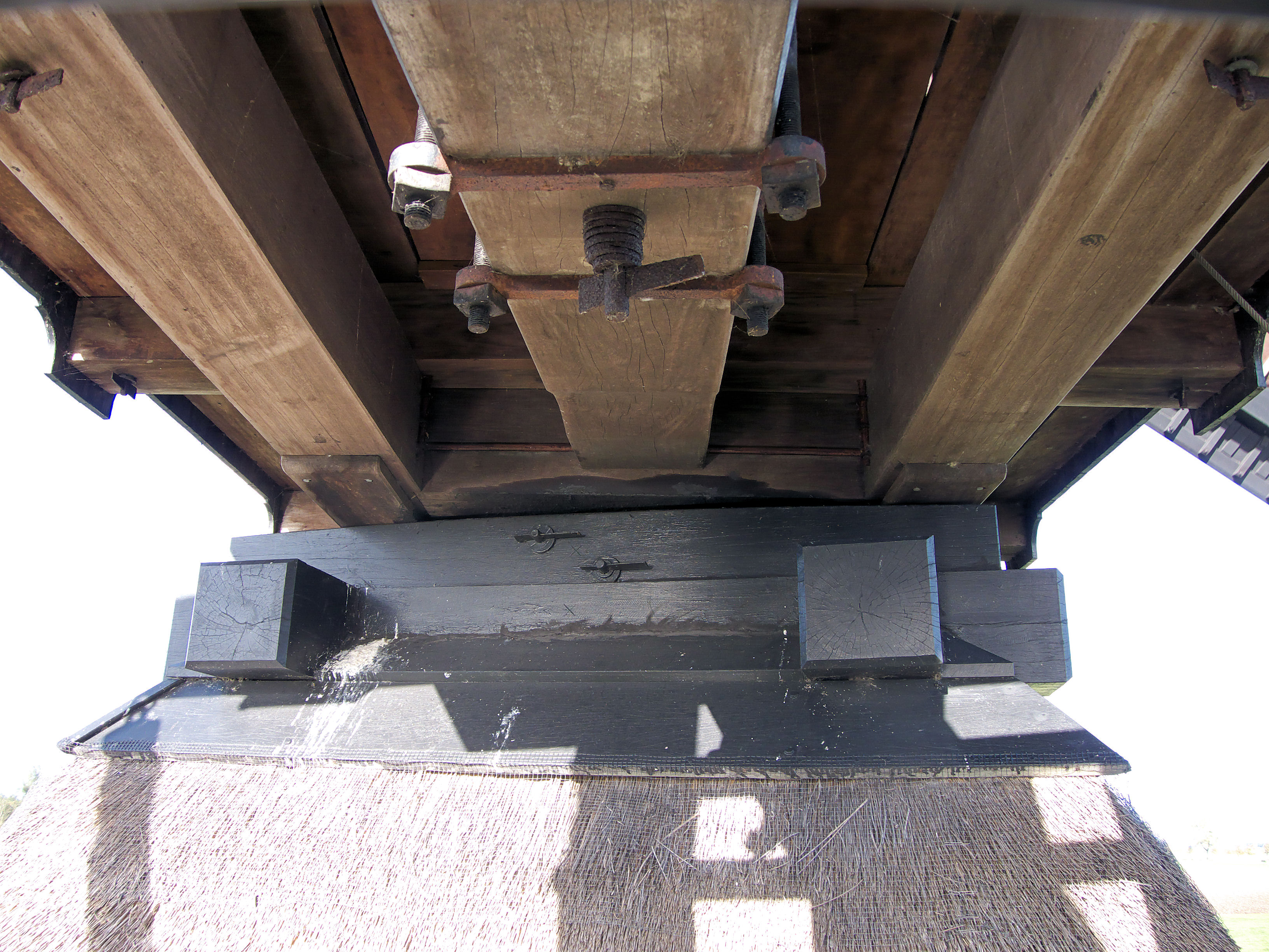 Noordeveldse molen, Dussen, Netherlands, onderzetel met slekken